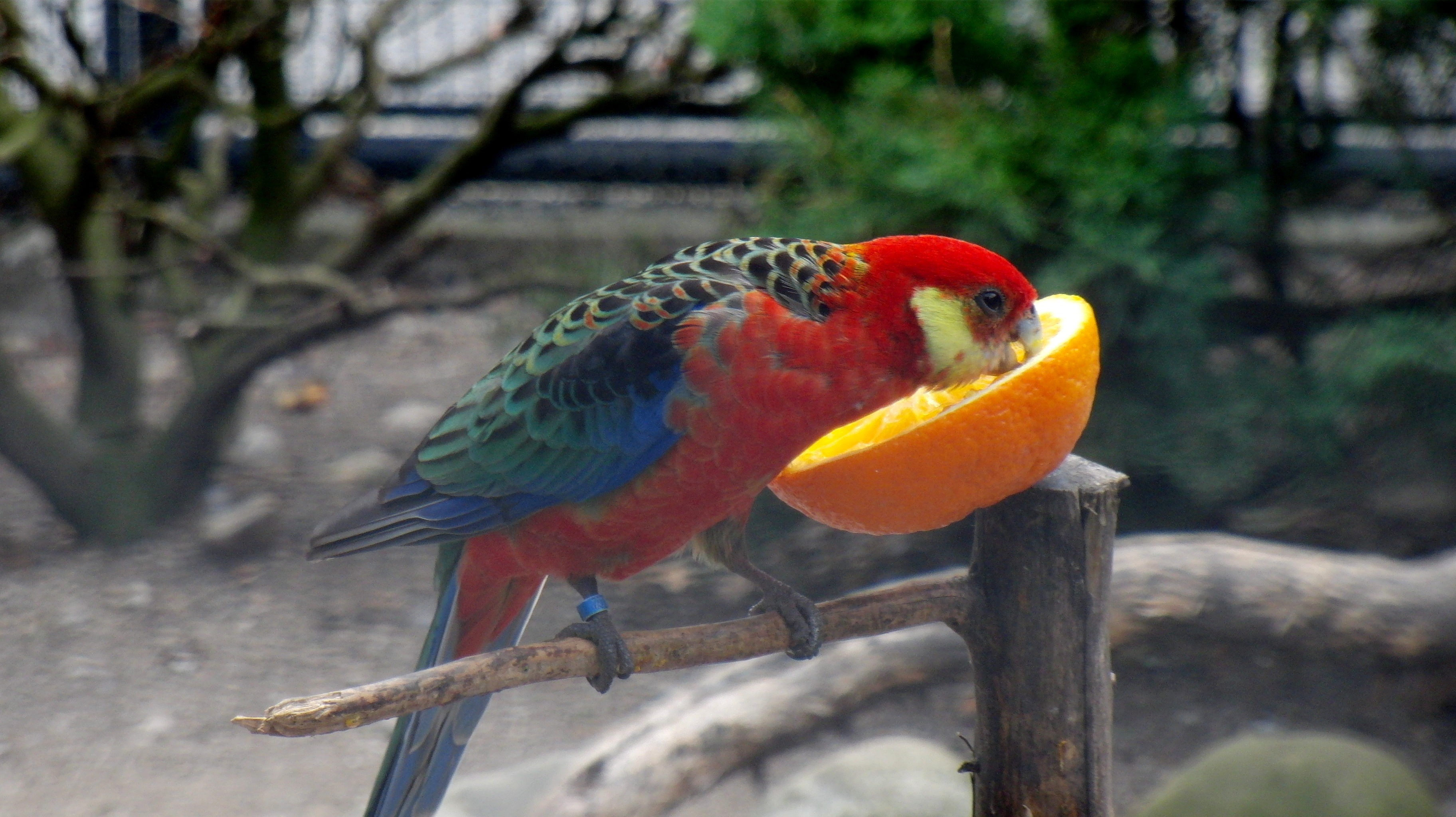 Stanleysittich im Lindengutpark («Vögelipärkli») in Winterthur